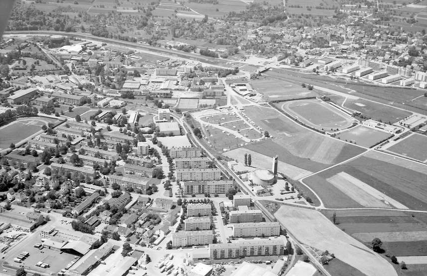 Lörrach-Nordstadt: Blick von Osten auf das alte Stadtion, den Grüttpark, das Grüttpark-Stadion und St. Peter